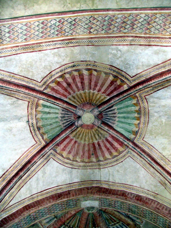 Asti, Chiesa di Santa Maria di Viatosto: interno, dettaglio volta gotica.